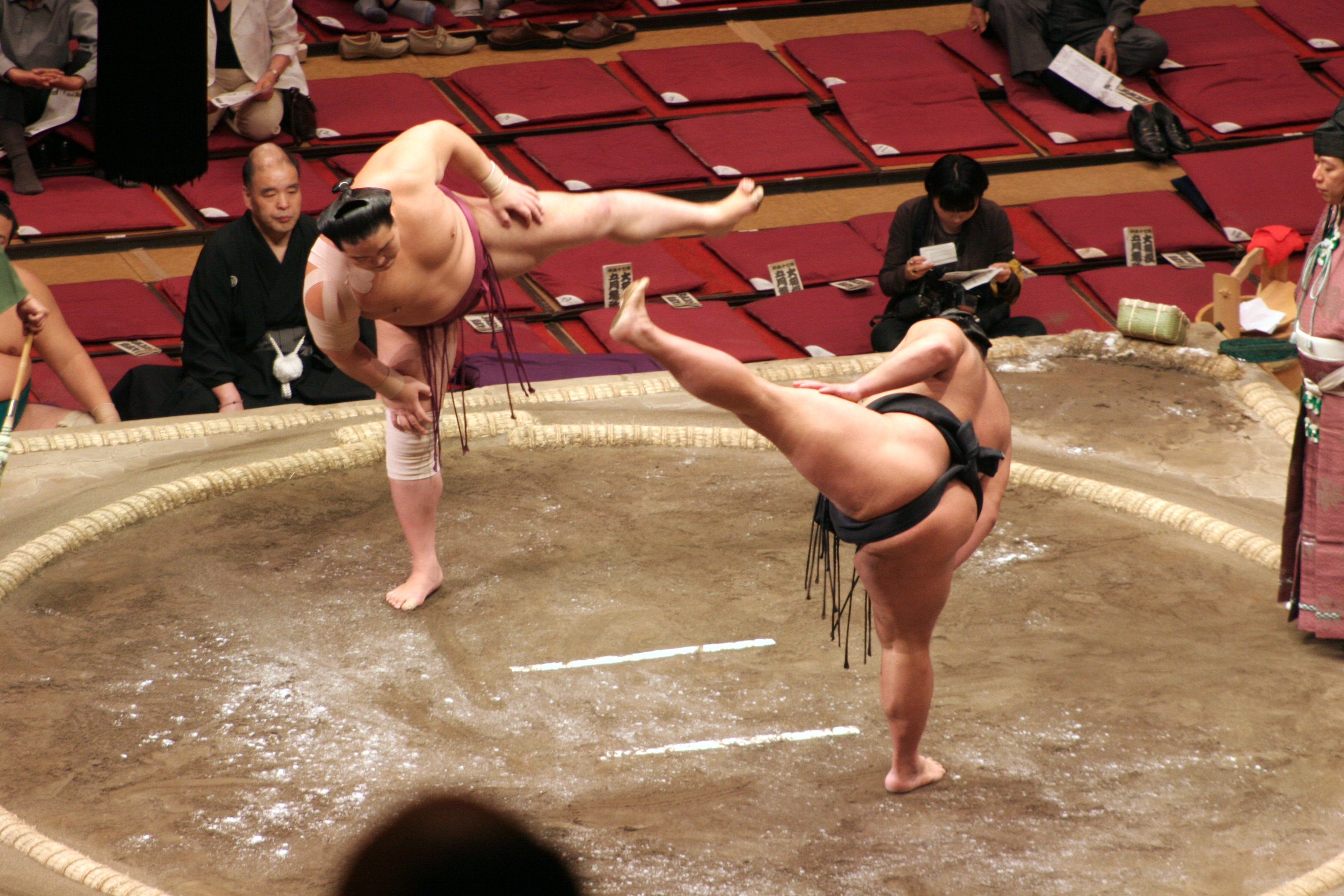 japon, tokyo, le rituel d'intimidation avant le combat